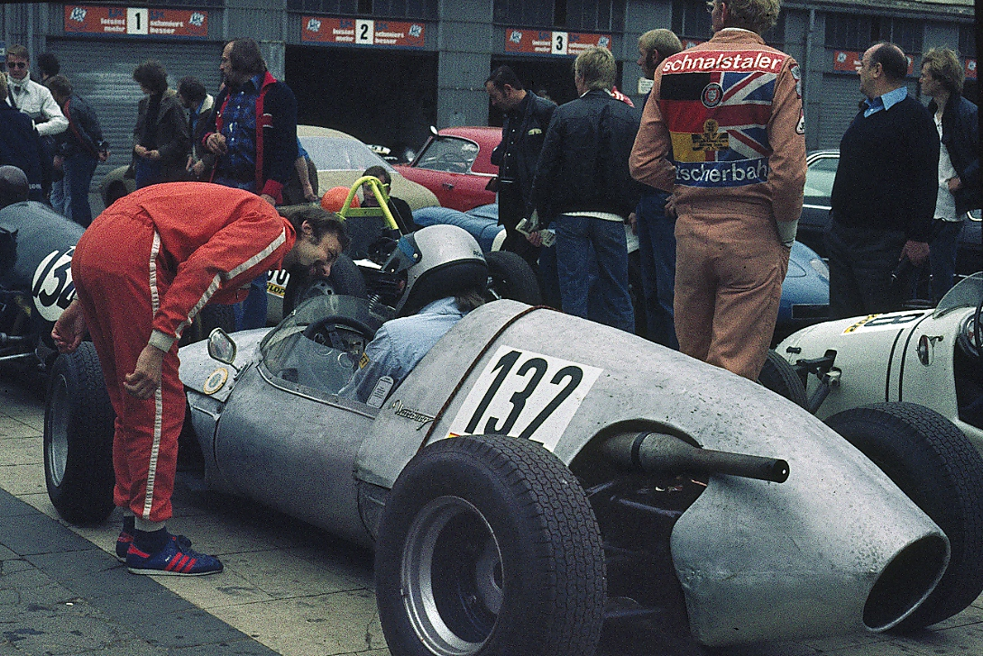 Melkus-Wartburg Formel Junior, Baujahr 1959 beim Oldtimer-Grand-Prix 1978 auf dem Nürburgring